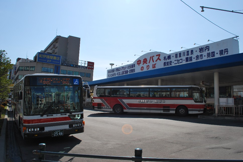 北海道中央バス小樽駅前のバスターミナル 北海道小樽市小樽駅前の公道上で撮影